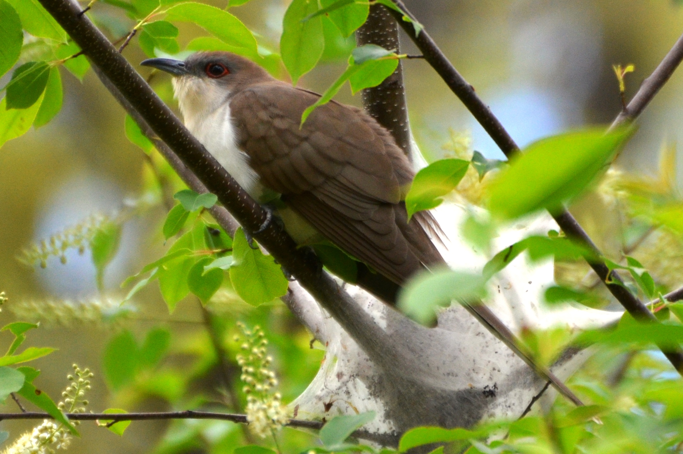 Carondelet Park 4/29/14